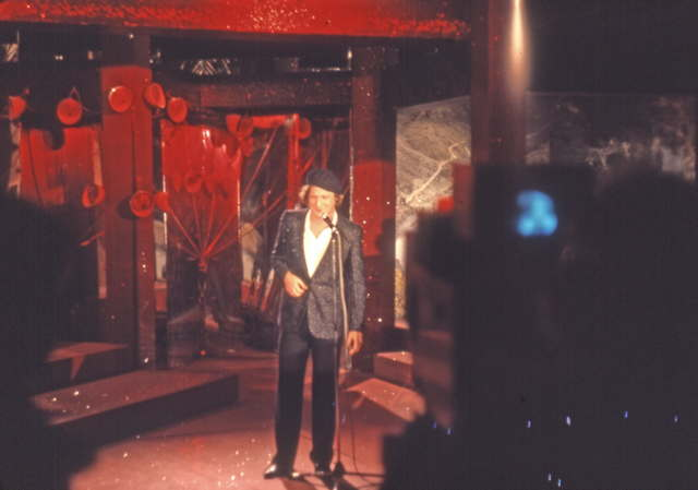 L'humoriste en direct sur TF1 dans le cadre de l'émission Midi Première.